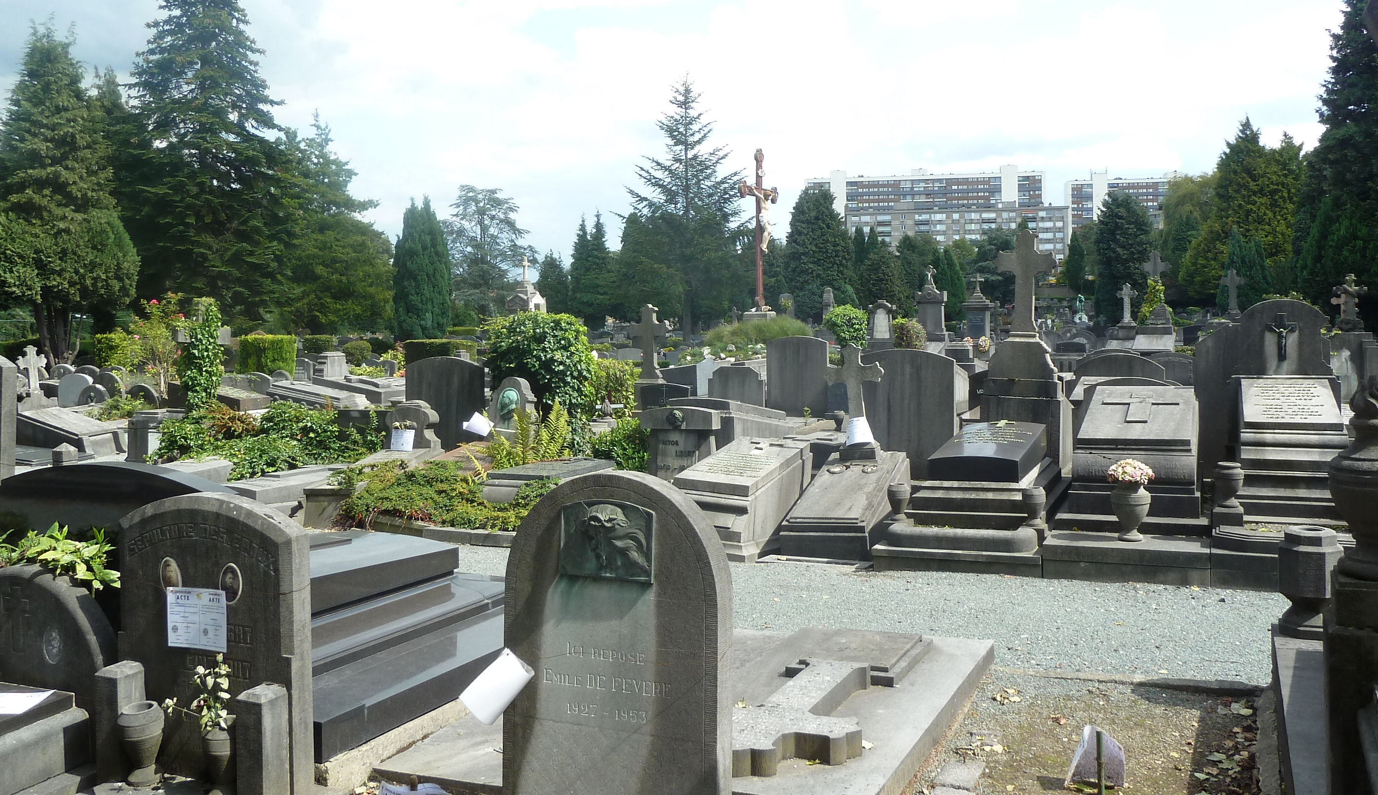 Khof van Jette